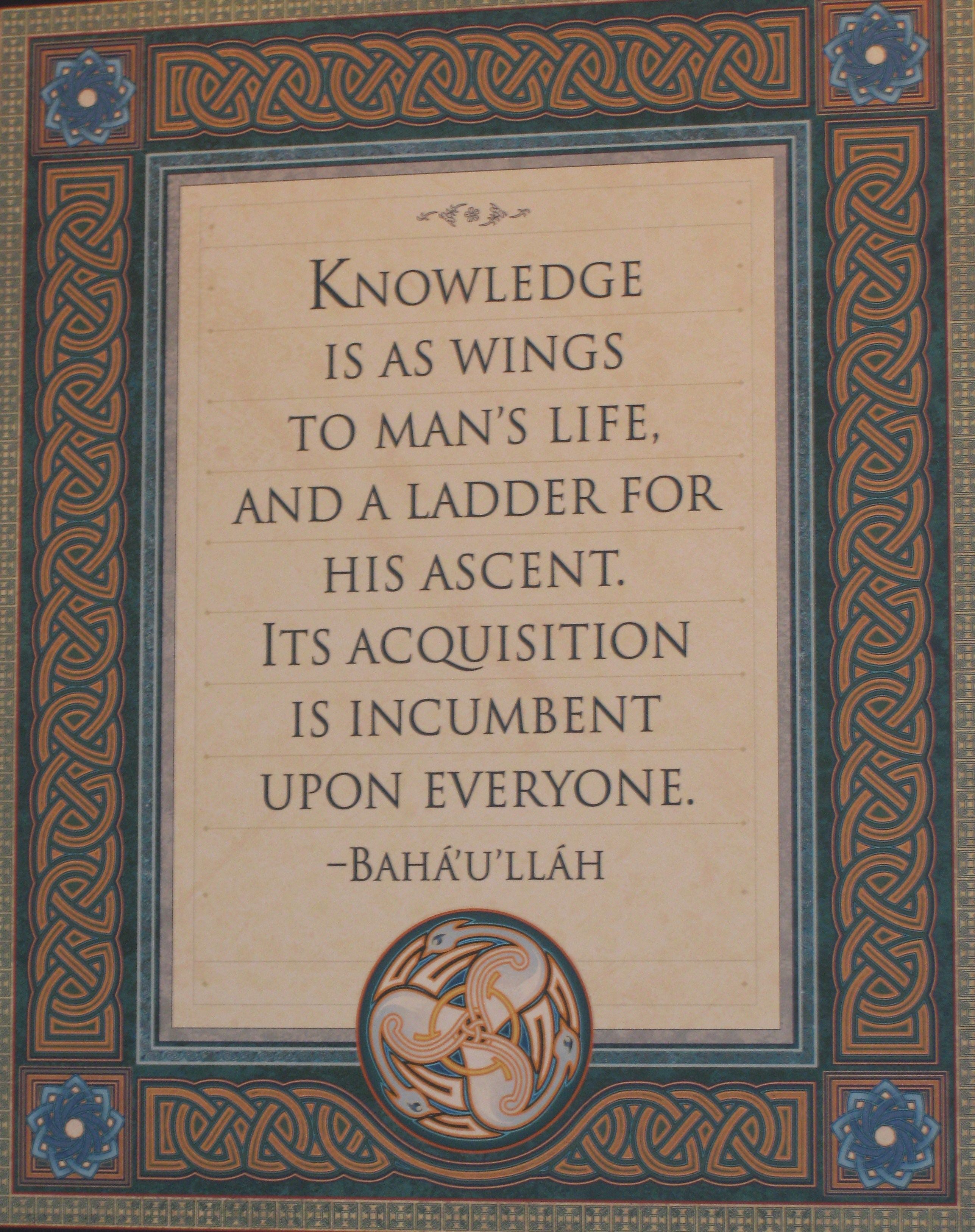 Bahai Texts טקסטים בהאיים במרכז המבקרים שבגנים הבהאיים בחיפה